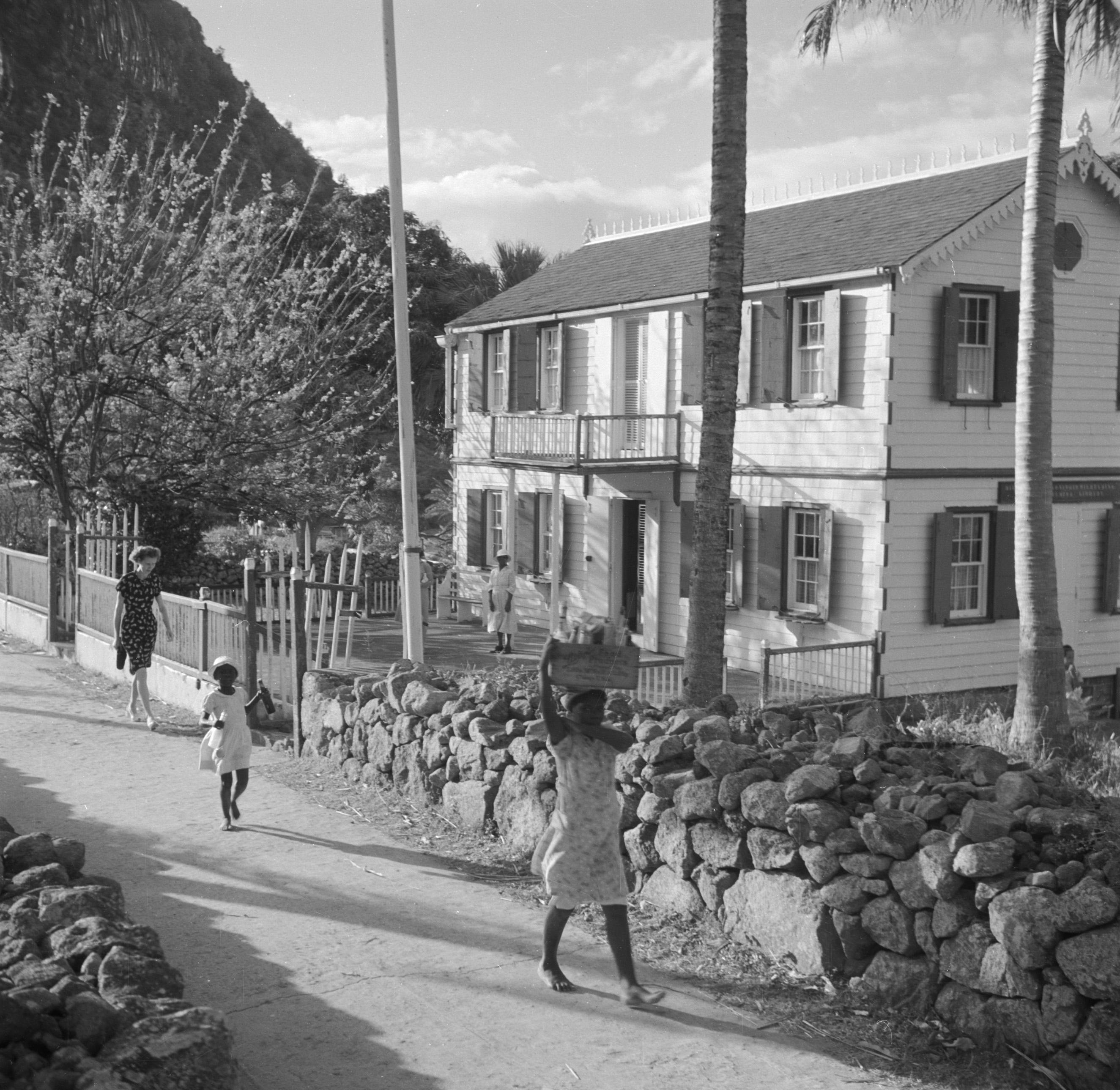 Collectie / Archief : Fotocollectie Van de Poll Reportage / Serie : Reis naar Suriname en de Nederlandse Antillen Beschrijving : Het gouvernements logeergebouw in The Bootom op Saba Datum : 1947 Locatie : Nederlandse Antillen, Saba Trefwoorden : hotels Fotograaf : Poll, Willem van de, [onbekend] Auteursrechthebbende : Nationaal Archief Materiaalsoort : Negatief (zwart/wit) Nummer archiefinventaris : bekijk toegang 2.24.14.02 Bestanddeelnummer : 252-8207